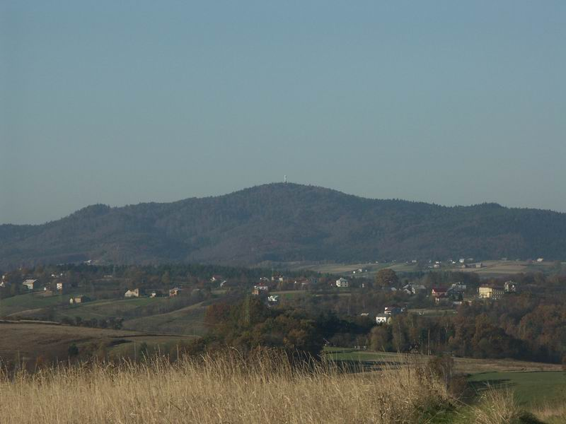 Góra Liwocz (lato)